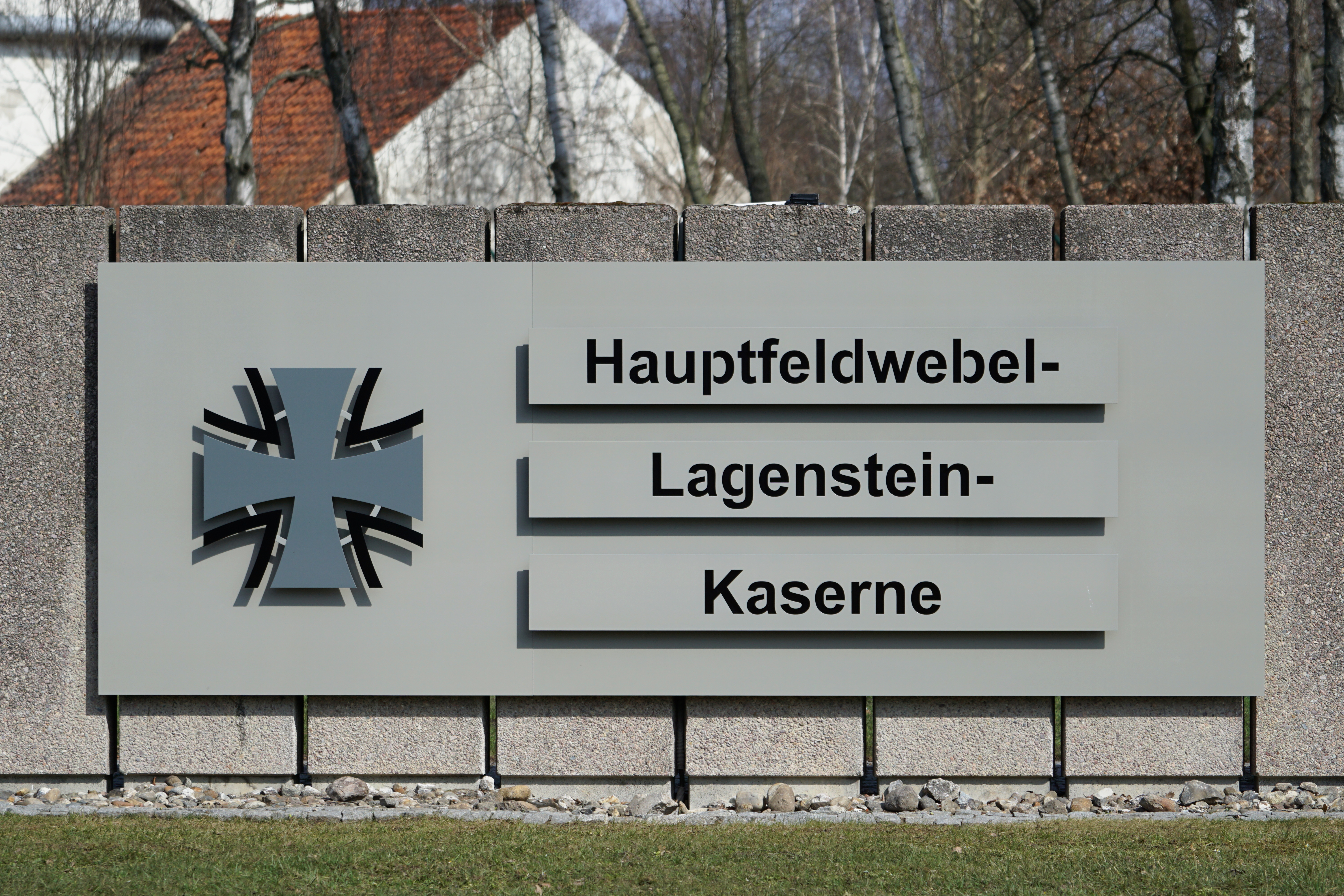 Schild am Haupteingang der Hauptfeldwebel-Lagenstein-Kaserne, Kugelfangtrift 1 in Hannover